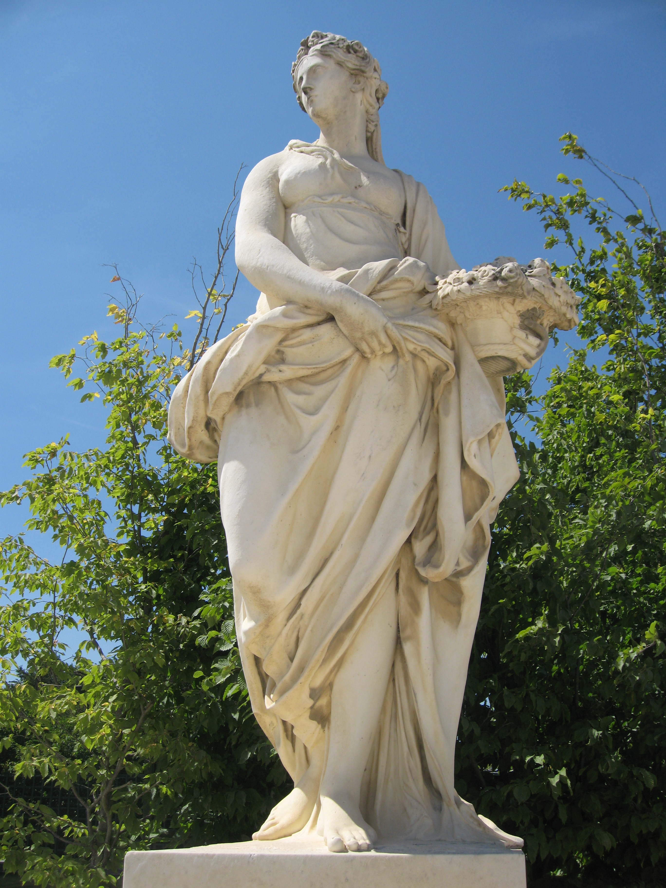 Le Printemps, de Philippe Magnier